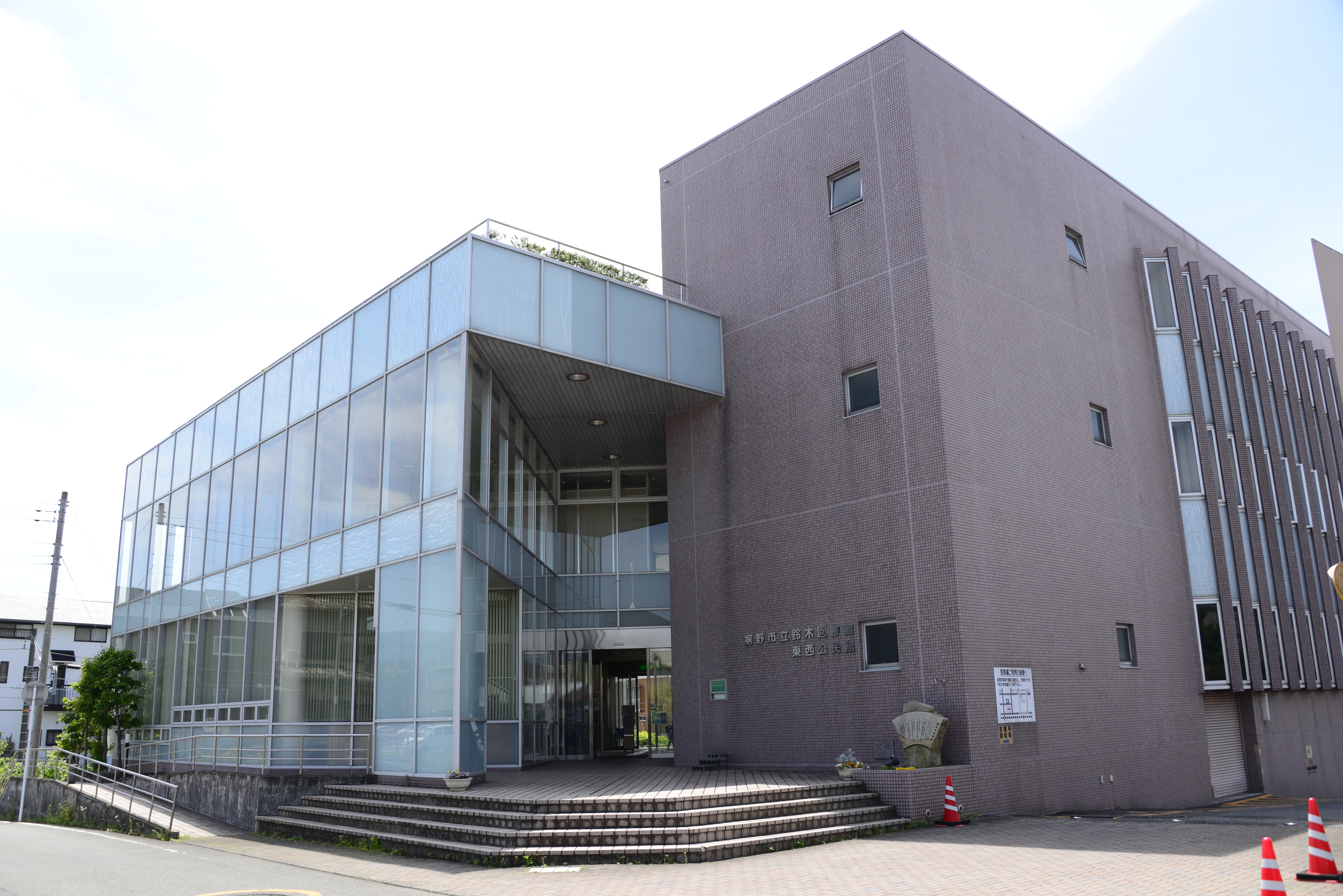 裾野市立鈴木図書館外観（北西からみた外観）